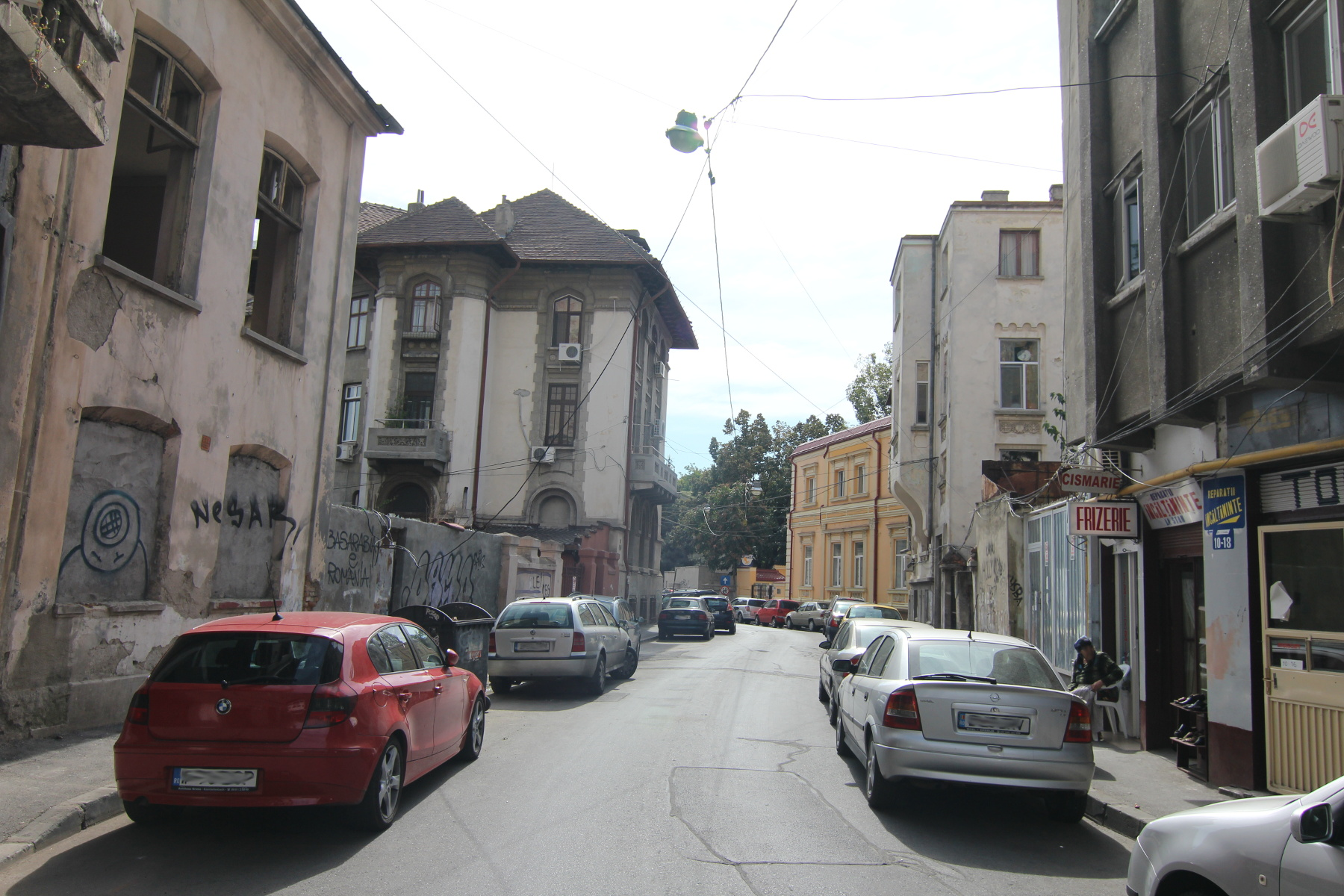 Ansamblul de arhitectură "Str. Radu Calomfirescu nr. 9-15; 10-16"